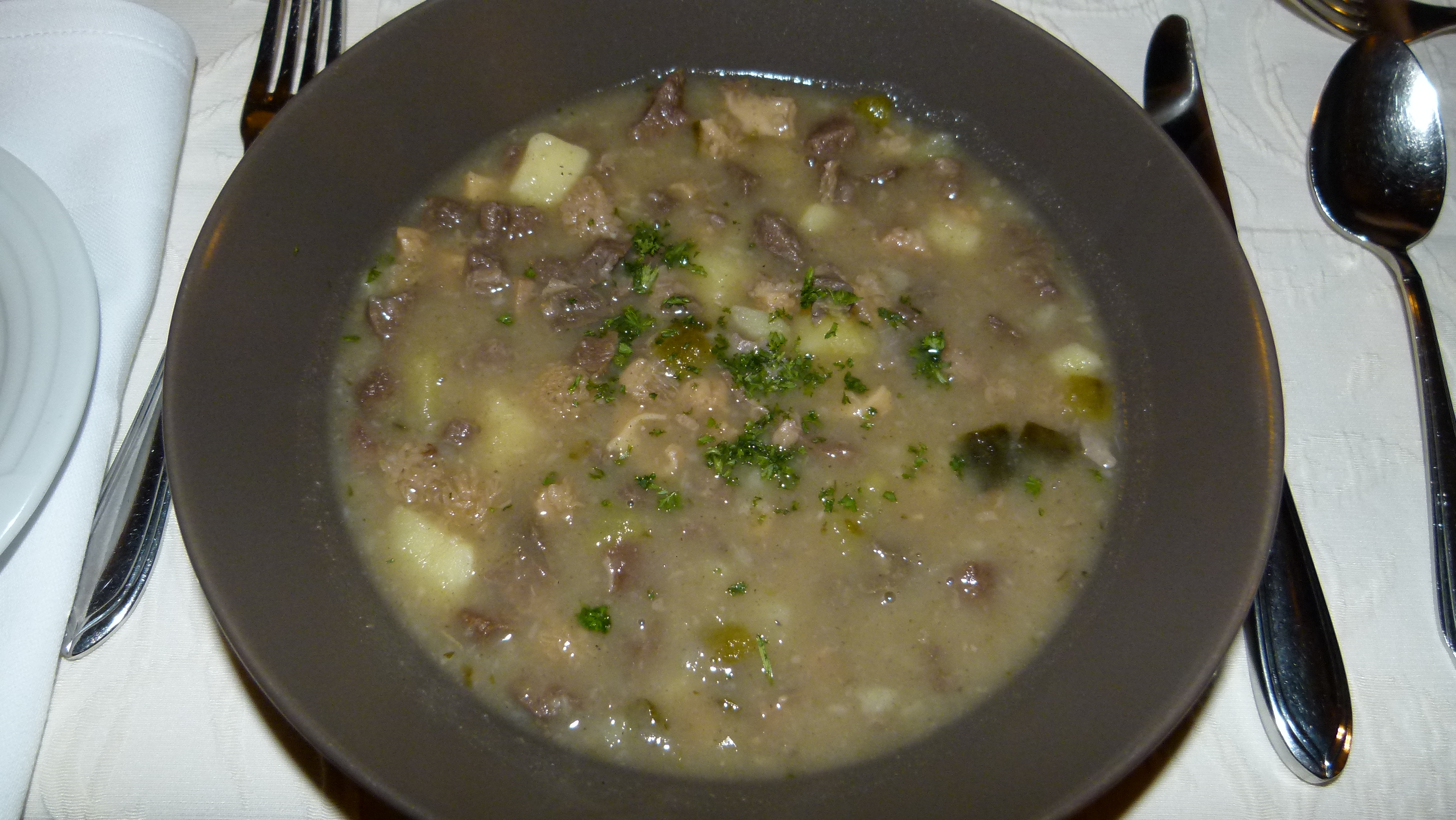 Süß-saure Flecke, Sächsische Suppe, Restaurant "Elbterrasse Wachwitz", Dresden